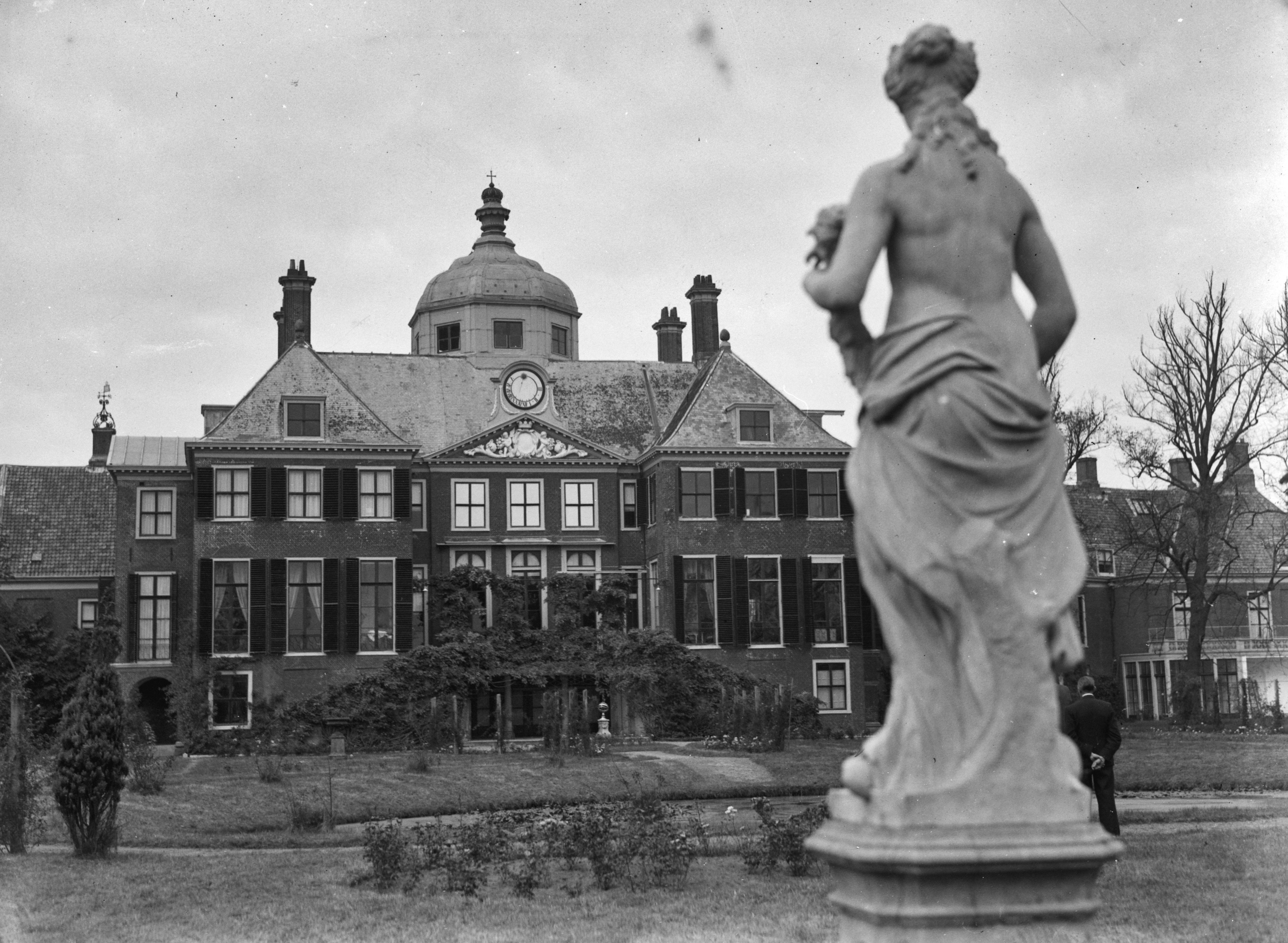 Collectie / Archief : Fotocollectie Anefo Reportage / Serie : [ onbekend ] Beschrijving : Herstelde Paleis Huis ten Bosch Datum : 14 oktober 1946 Instellingsnaam : Paleis Huis ten Bosch Fotograaf : Fotograaf Onbekend / Anefo Auteursrechthebbende : Nationaal Archief Materiaalsoort : Negatief (zwart/wit) Nummer archiefinventaris : bekijk toegang 2.24.01.04 Bestanddeelnummer : 901-9396